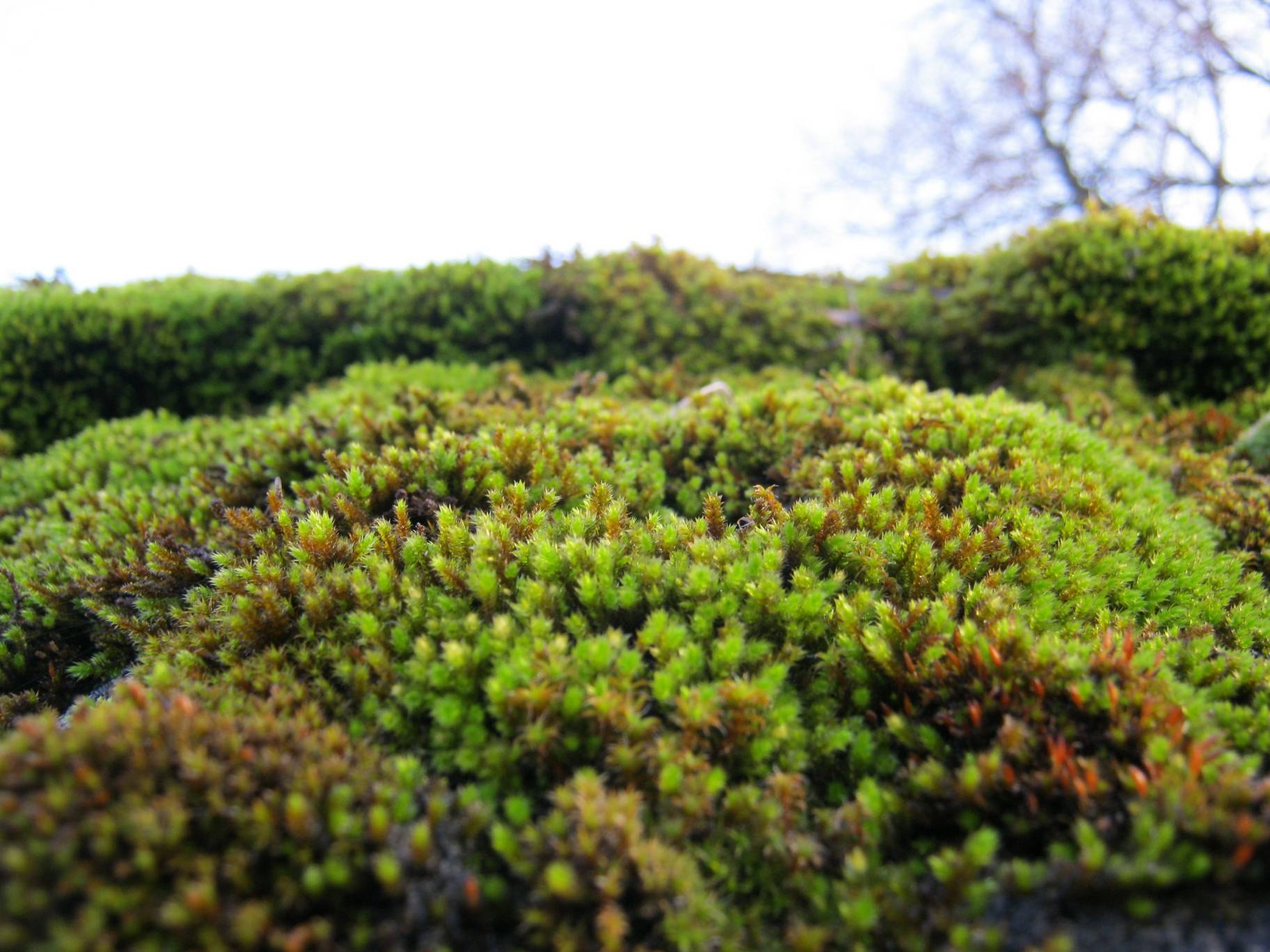 Фотографія моху на будинку старому.